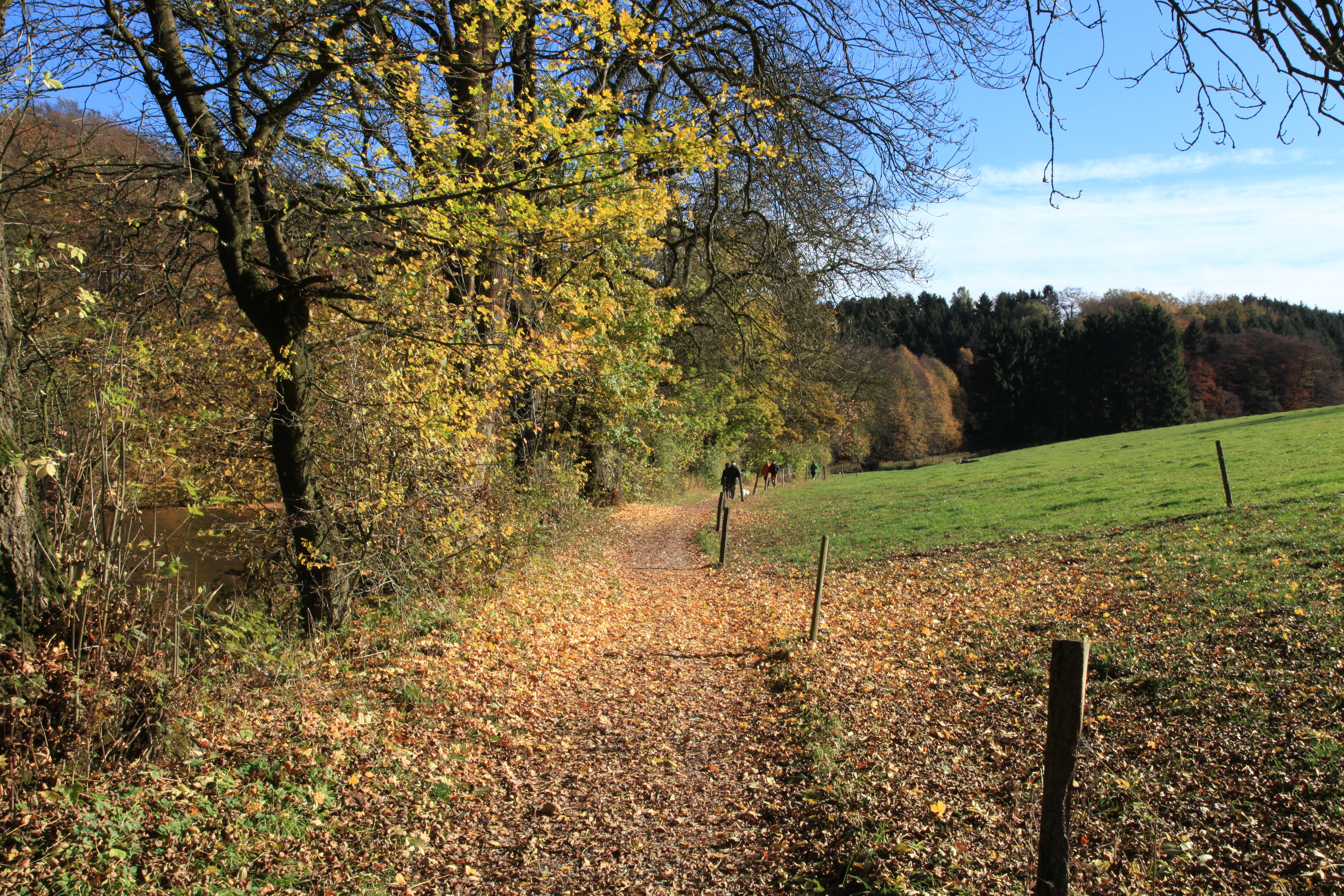 Heilenbecker Talsperre in Breckerfeld (nördlich Schiffahrt), Bereich im Landschaftsschutzgebiet „Breckerfeld“